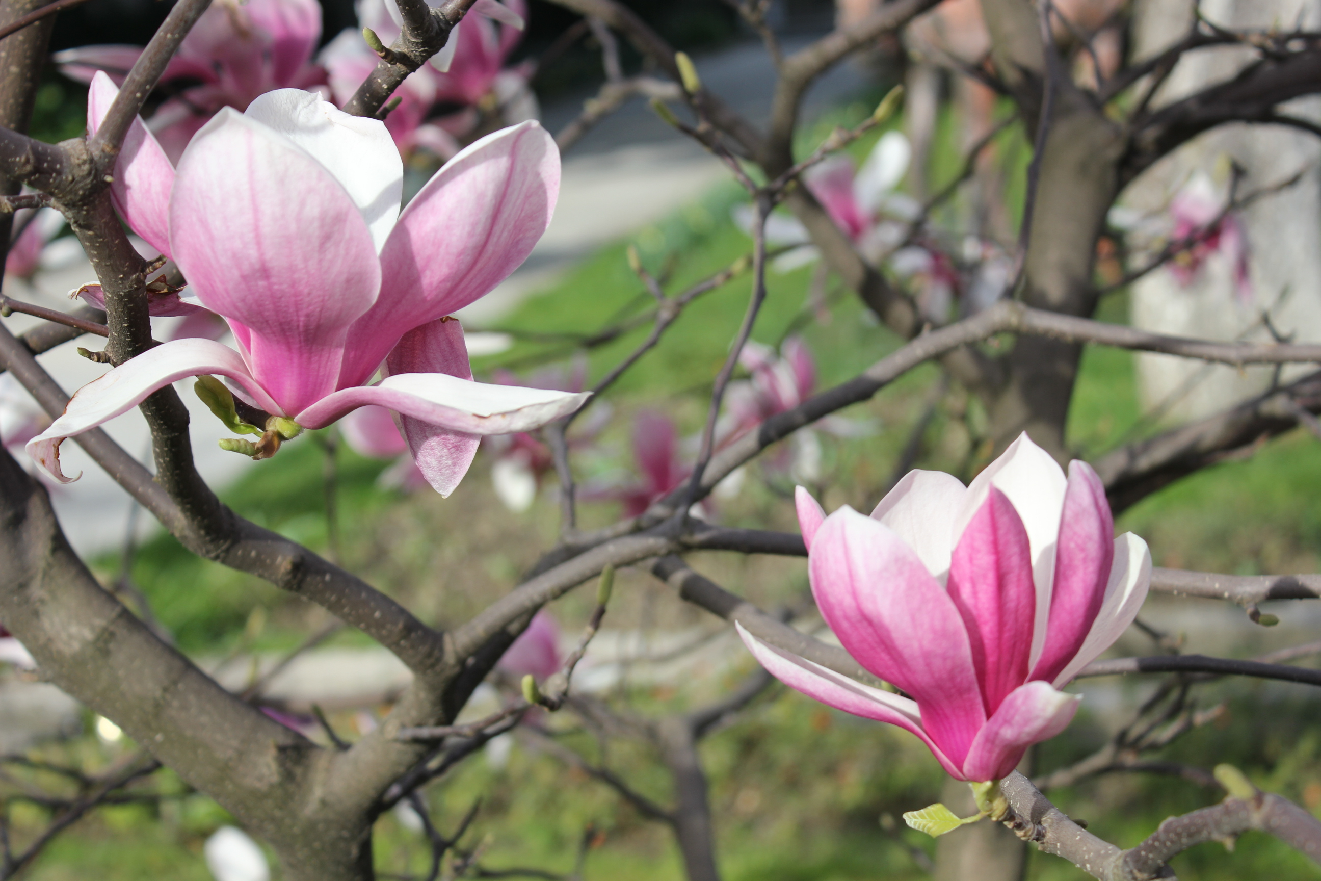 Магнолия Суланжа, Сочи, 14 марта 2013 (теплая зима)